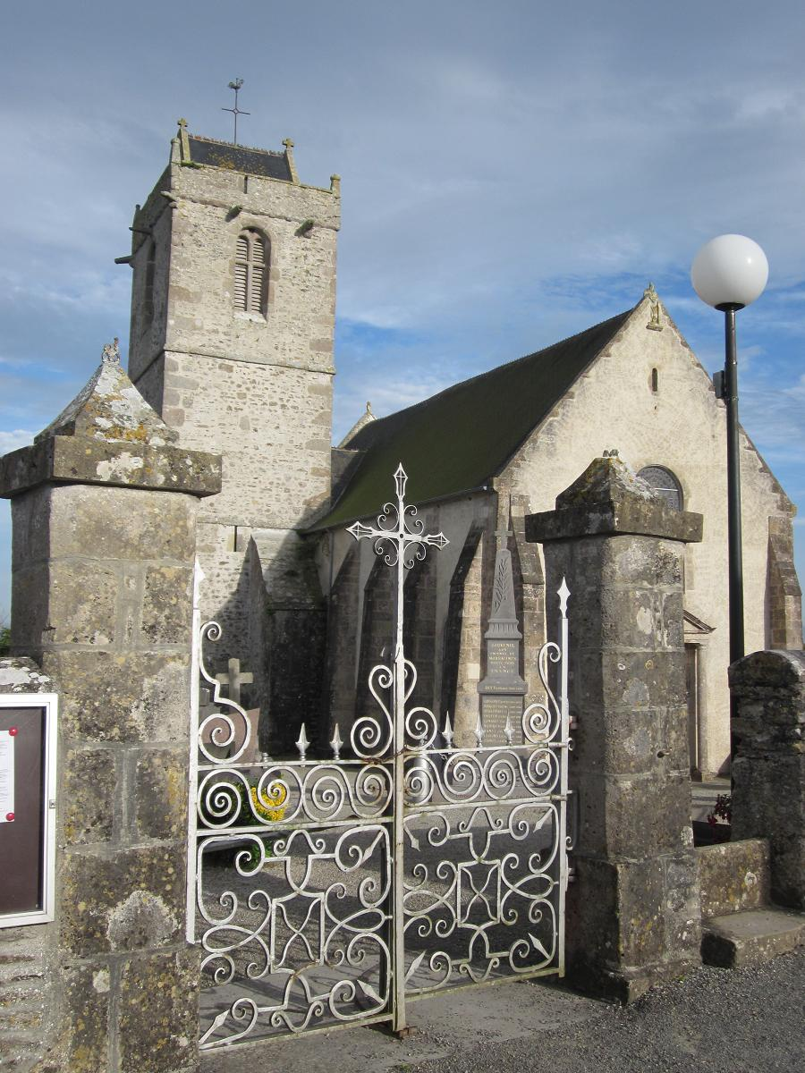 Vue de l'Eglise Notre-Dame à Morsalines (60630) Manche - FRANCE